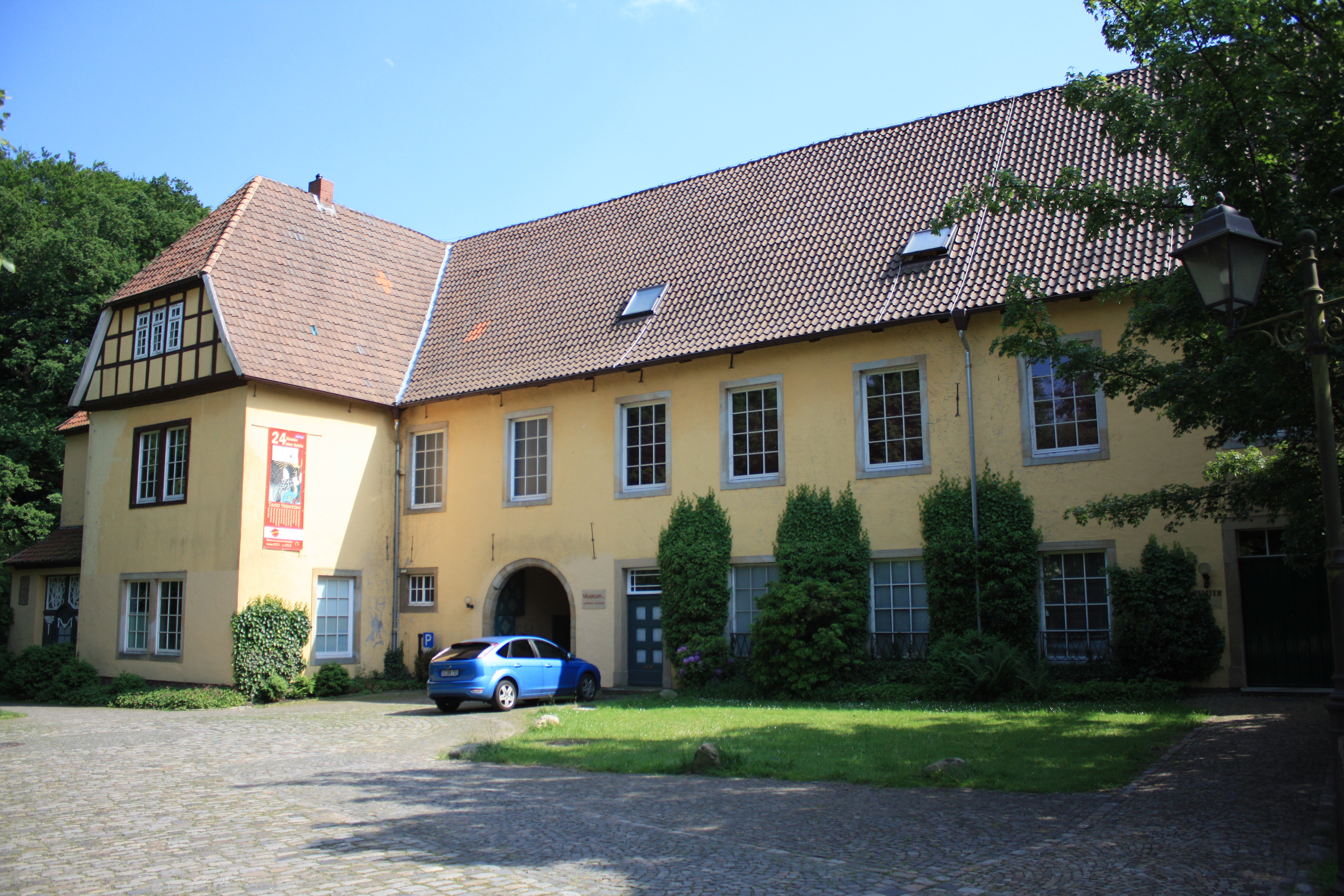 Kloster Bersenbrück; heute Kreismuseum